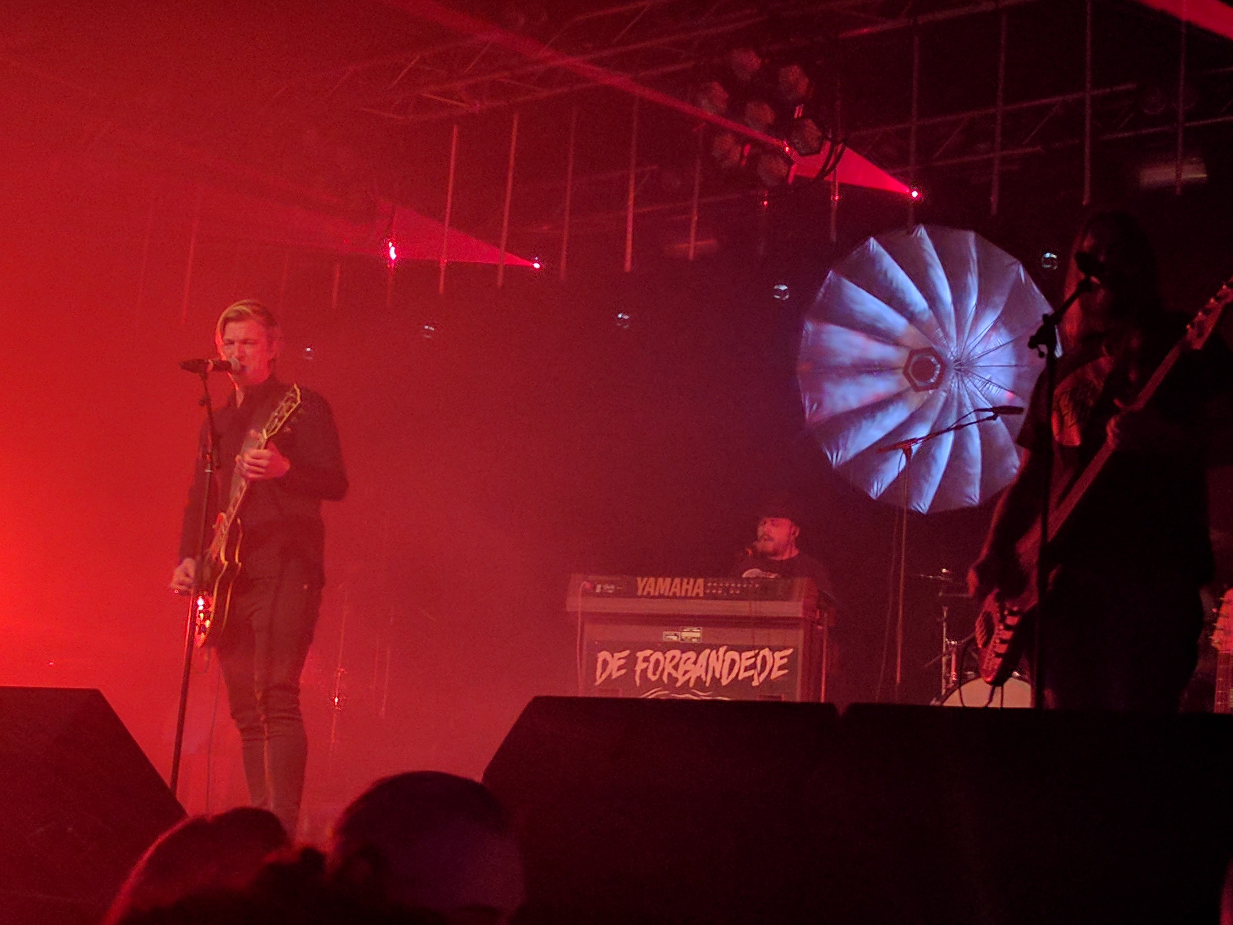 De Forbandede live til Odense Live Prisen